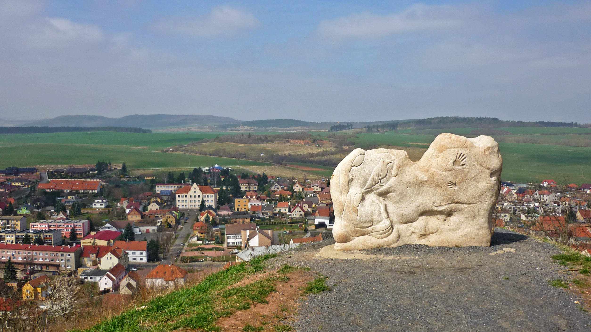 Blick von der Schillerwarte auf Kriegern (Kryry)